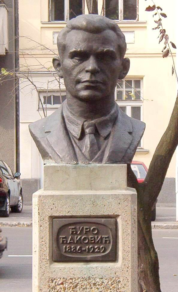 Споменик Ђури Ђаковићу на углу улица Француске и (бивше) улице Ђуре Ђаковића у београду. Сликао Голдфингер